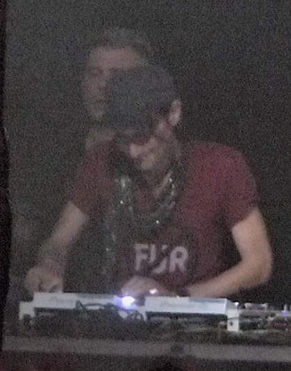 3D (Danny Howells, Dave Seaman, Darren Emerson). A felvétel 2017. december 31-én, Szilveszter napján készült a Millenáris B épületében. 3D (Danny Howells, Dave Seaman, Darren Emerson) és Anthony Pappa DJ elektronikus zenéje